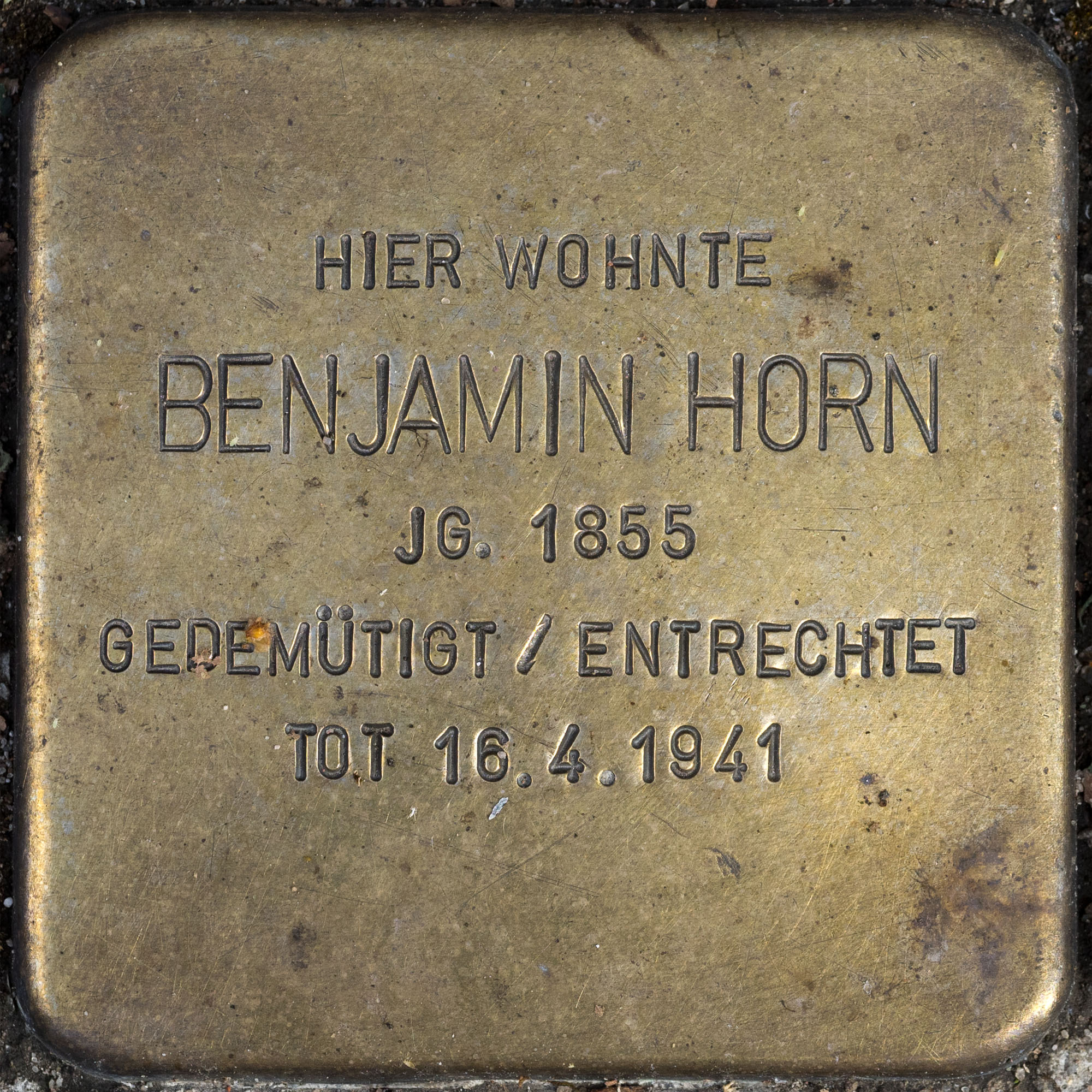 2016 Stolpersteine ToeVo Horn Benjamin